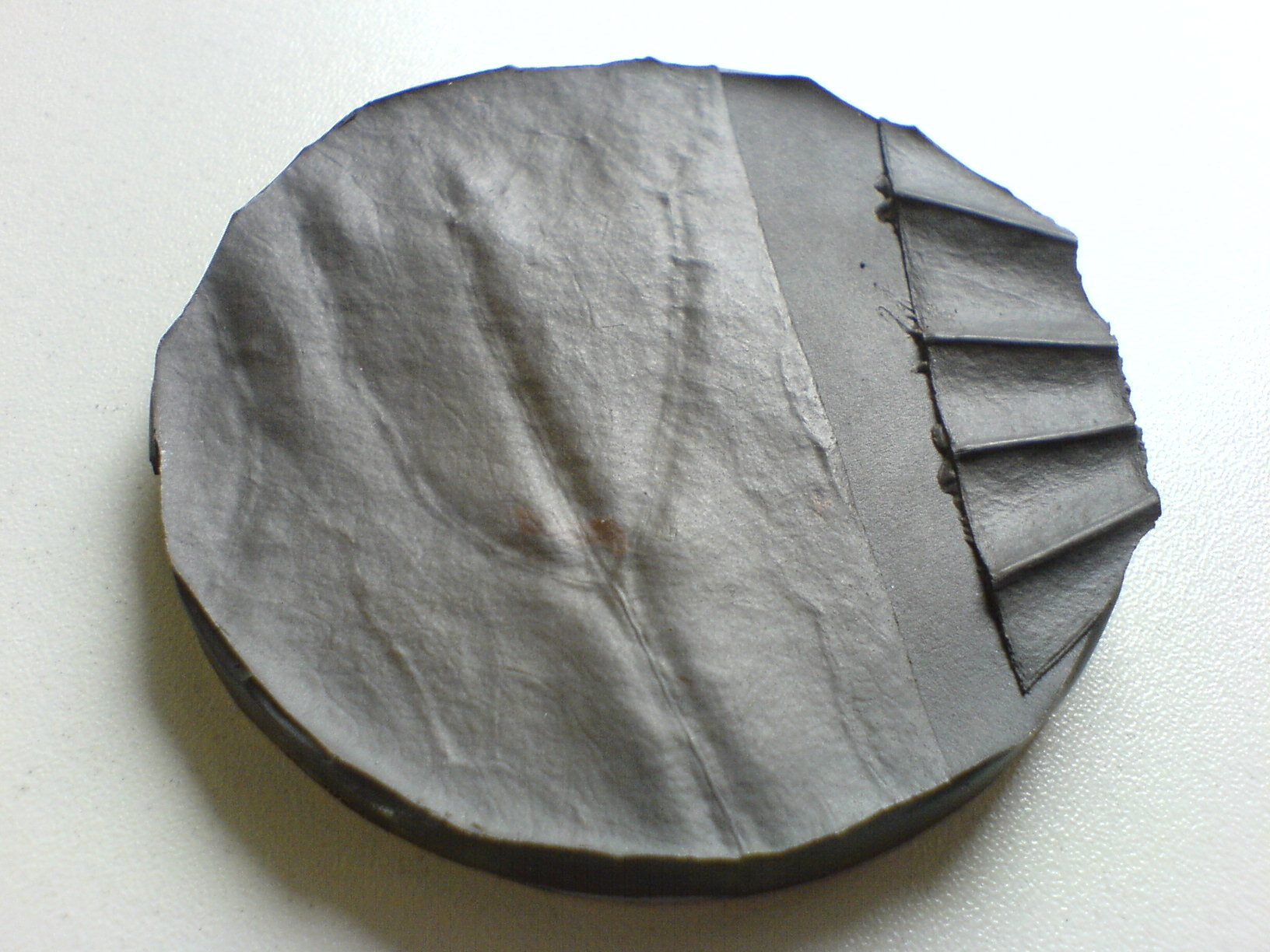 Lotusblatt (Selbstreinigende Wirkung) Es stellt ein Metallteil dar, das Eigentum der AWBTopTooling GmbH & Co.KG ( ist.